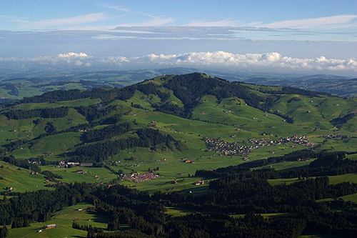 Nördlicher Ausblick vom Kronberg nach St.Jakobsbad und Gonten